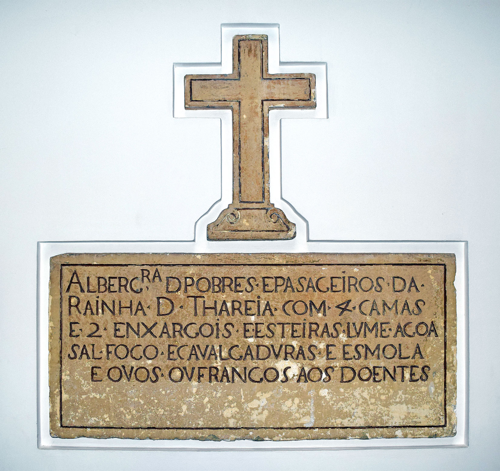 Lapide do Real Hospital de Albergaria